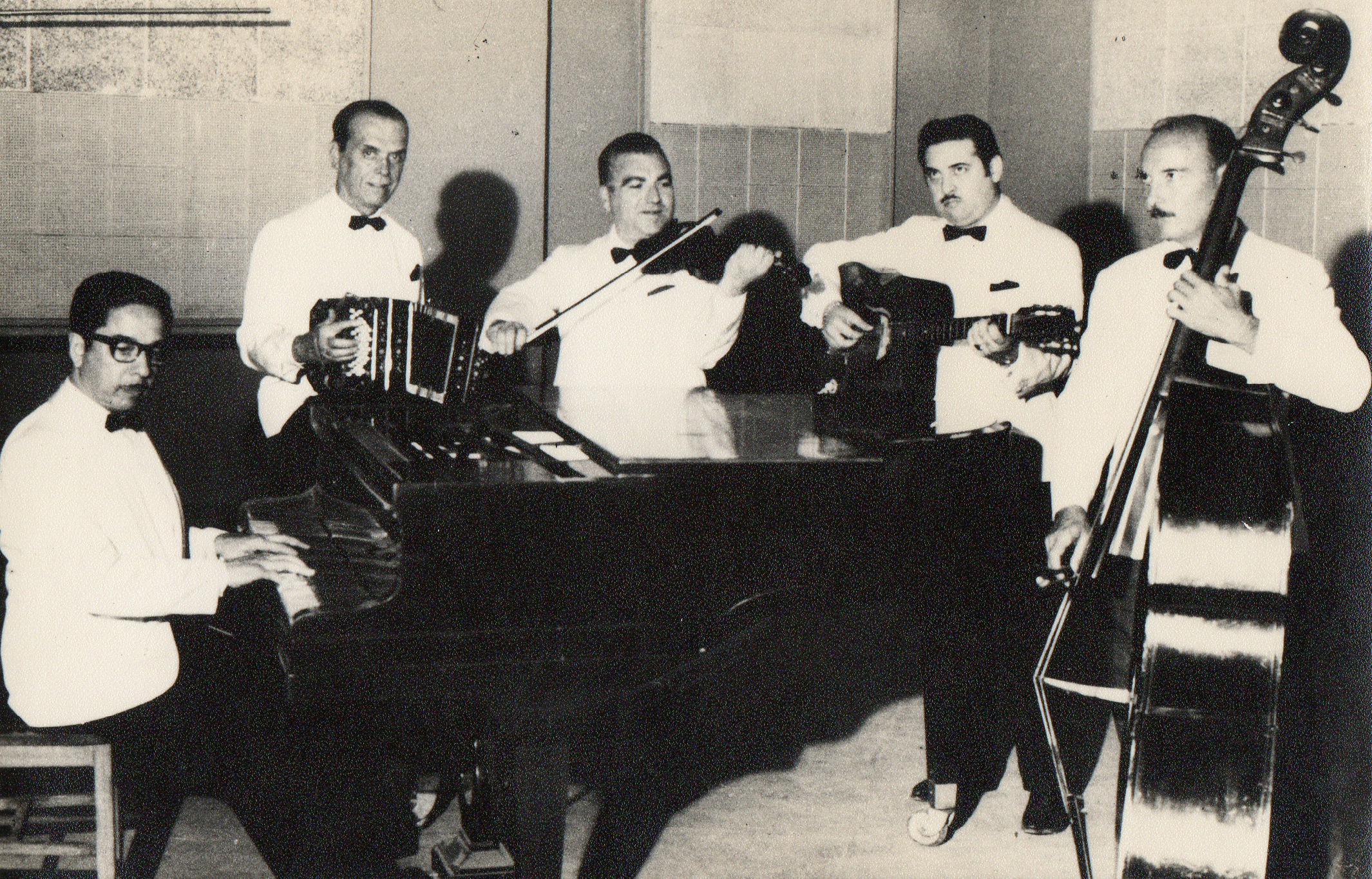 El Quinteto Real, conformado por (de izquierda a derecha): Horacio Salgán: piano Pedro Laurenz: bandoneón Enrique Mario Francini: violín Ubaldo de Lío: guitarra Rafael Ferro: contrabajo